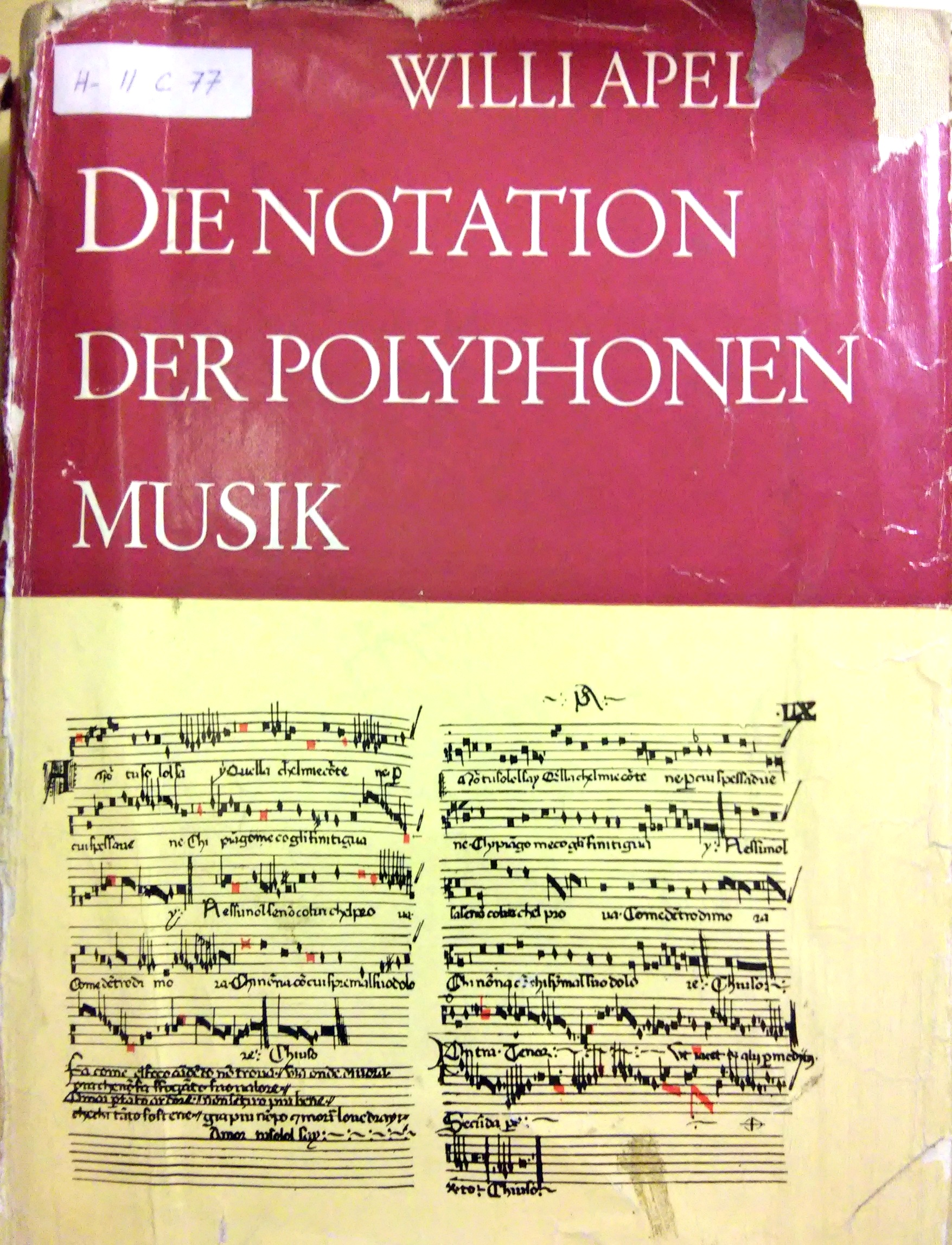 Willi Apel